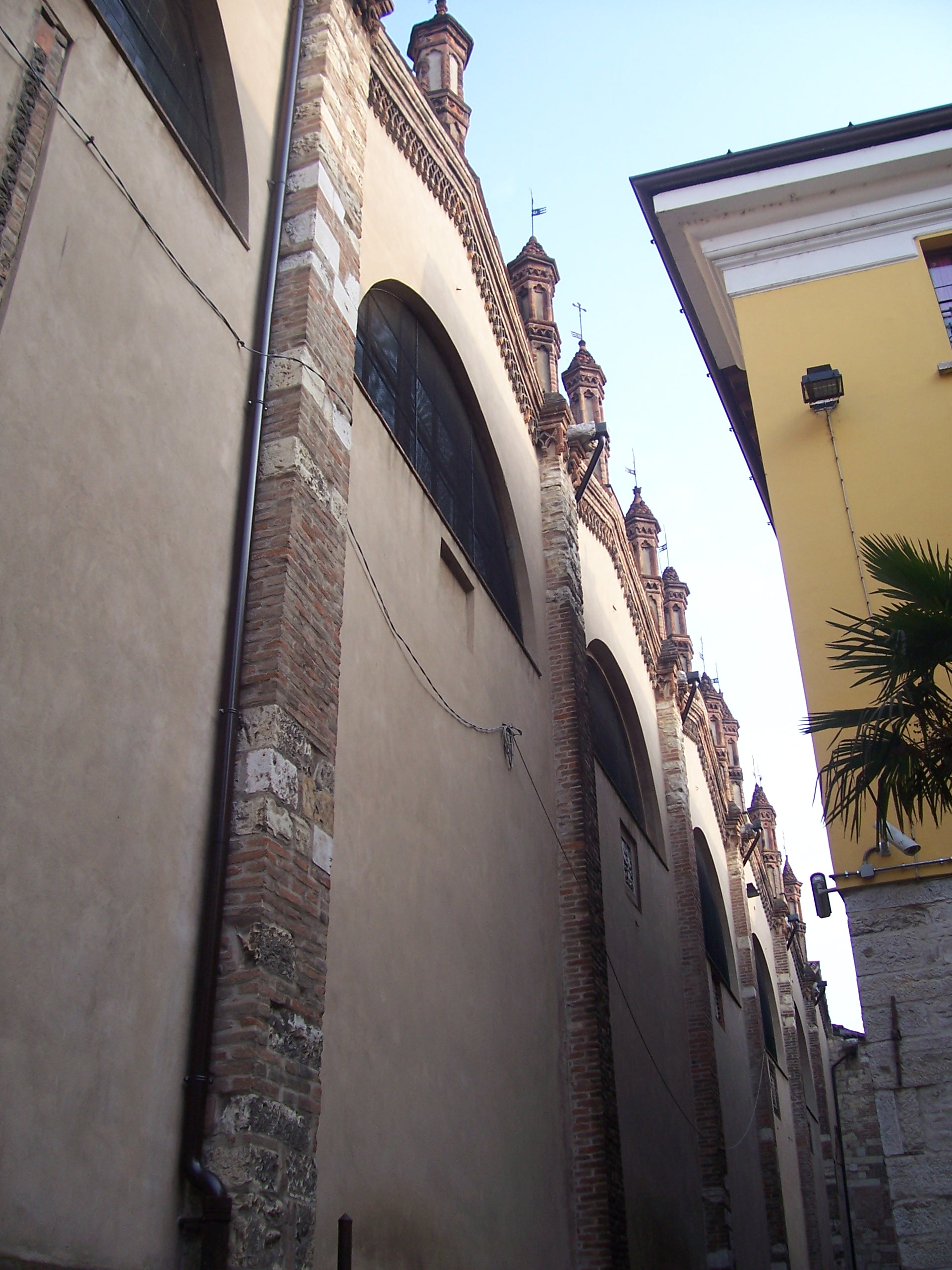 santa maria del carmine (brescia) esterno.jpg